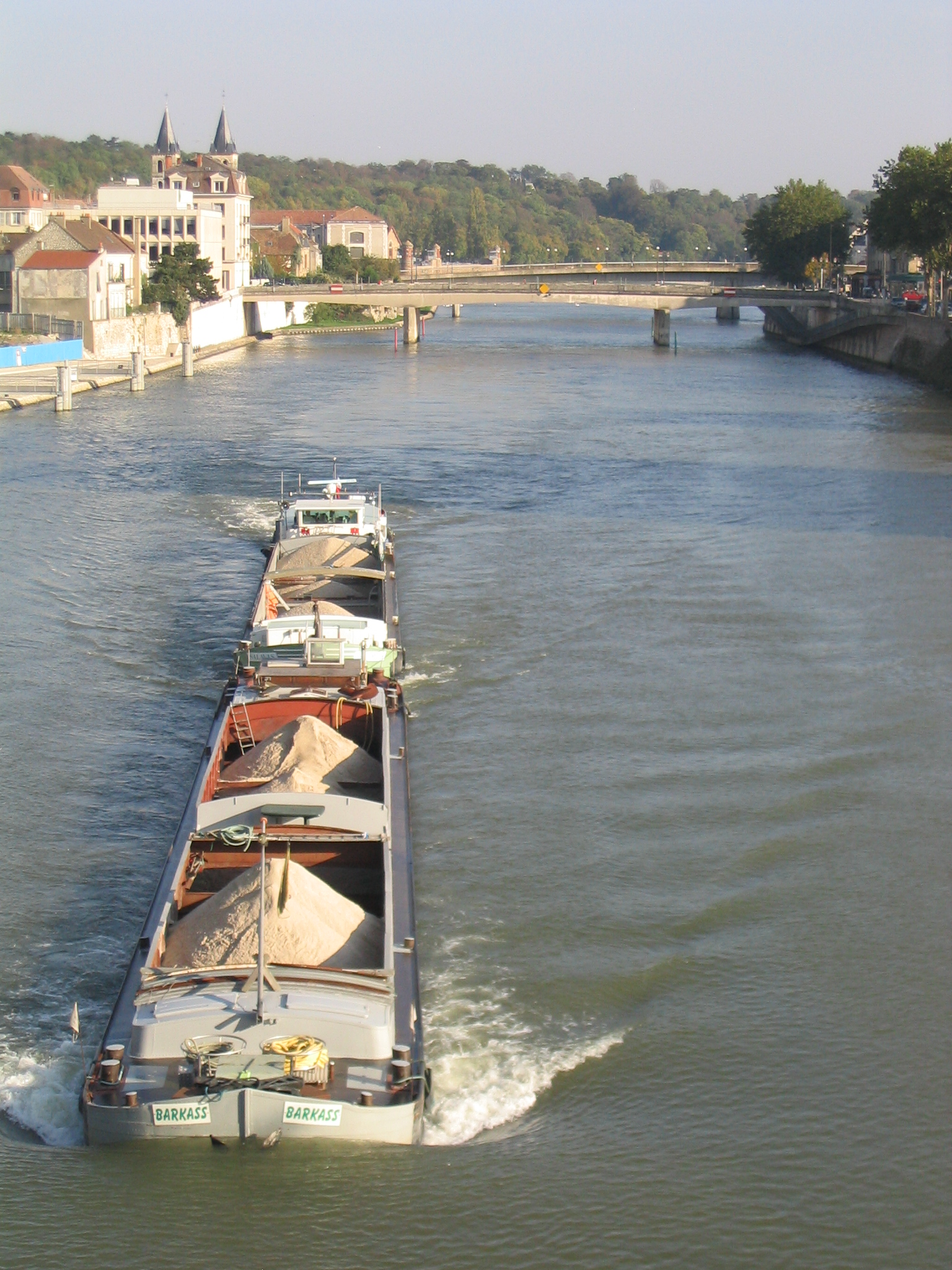 La Seine à Melun, entre l'île Saint Etienne et la rive Sud.